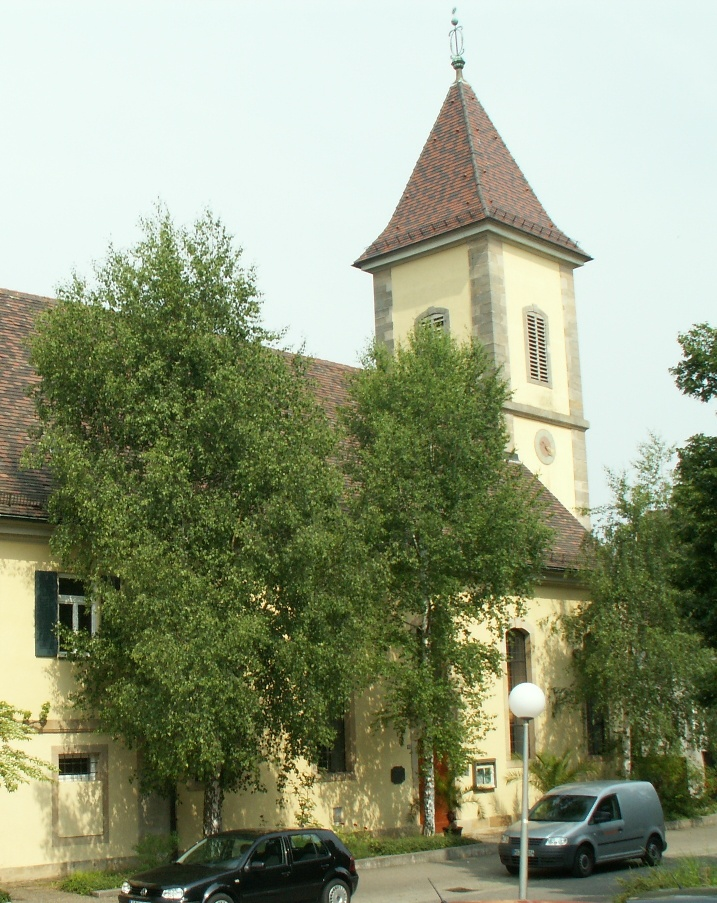 Franziska church in Stuttgart-Birkach, Germany